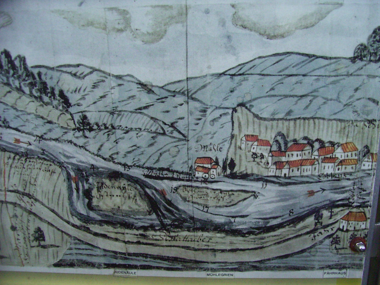 Foto eines Auschnittes einer Rheinkarte bei Koblenz um 1750